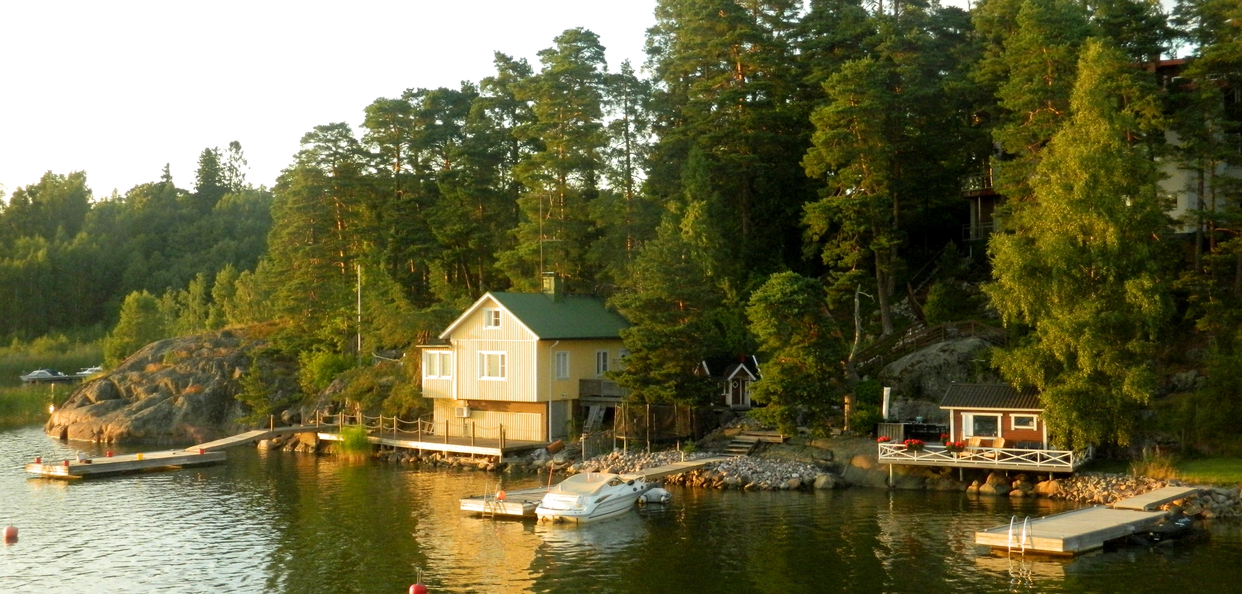 Rantasauna Espoon Saunaniemessä